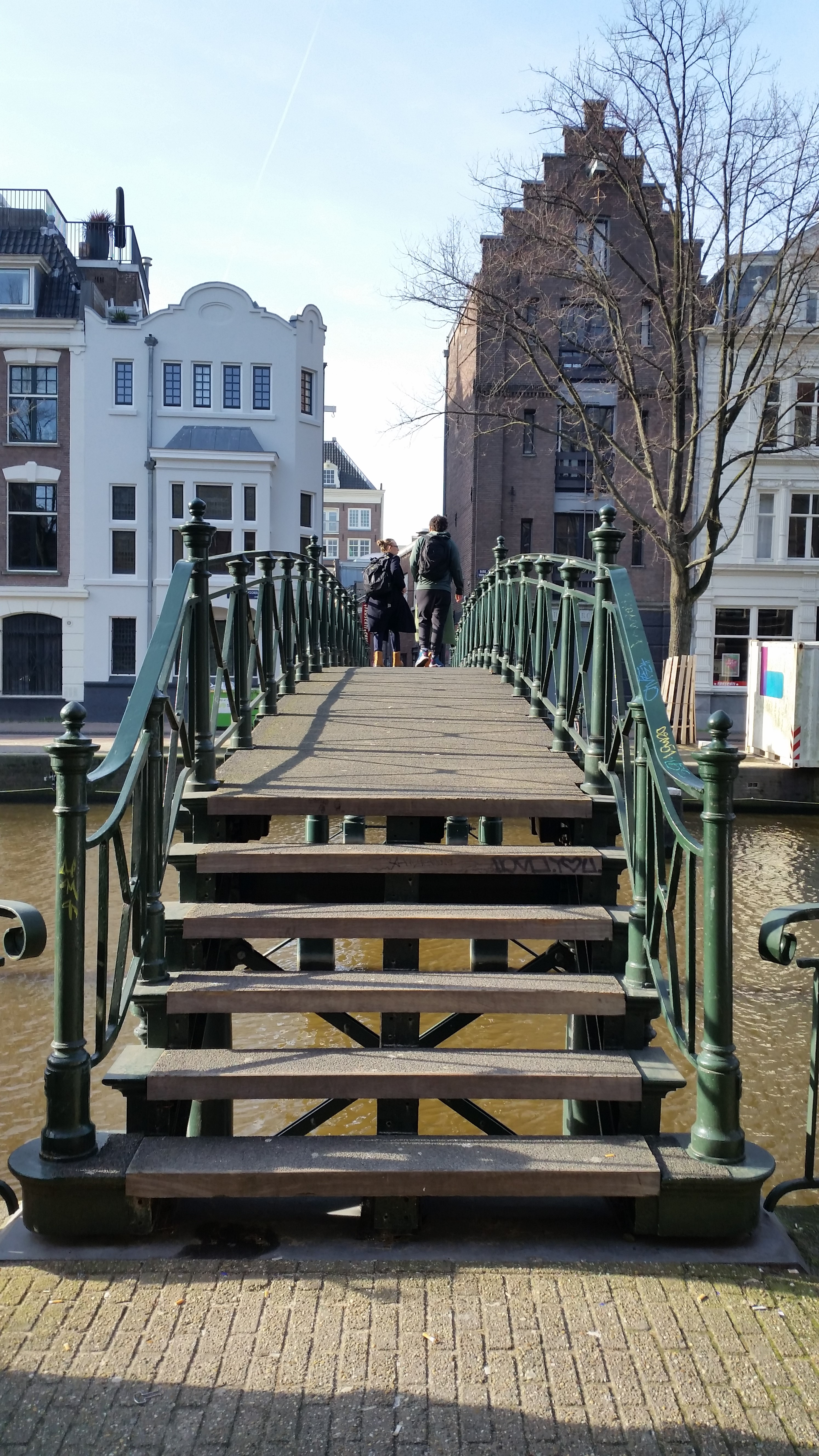 Overzichtsfoto van Brug 105, Makelaarsbruggetje